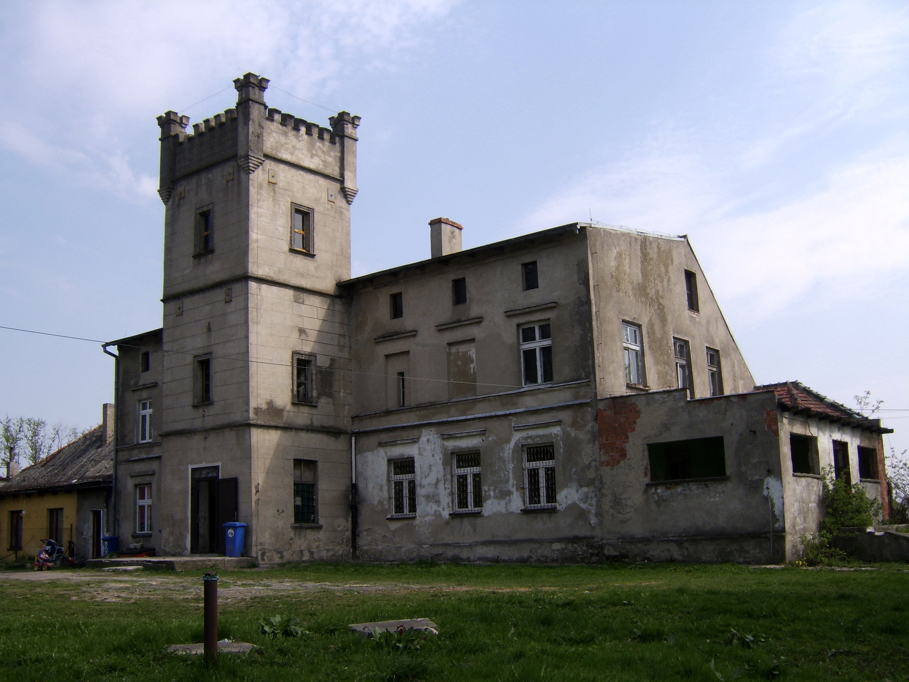 park dworski, 2 poł. XIX w. Storlus, Gmina Papowo Biskupie